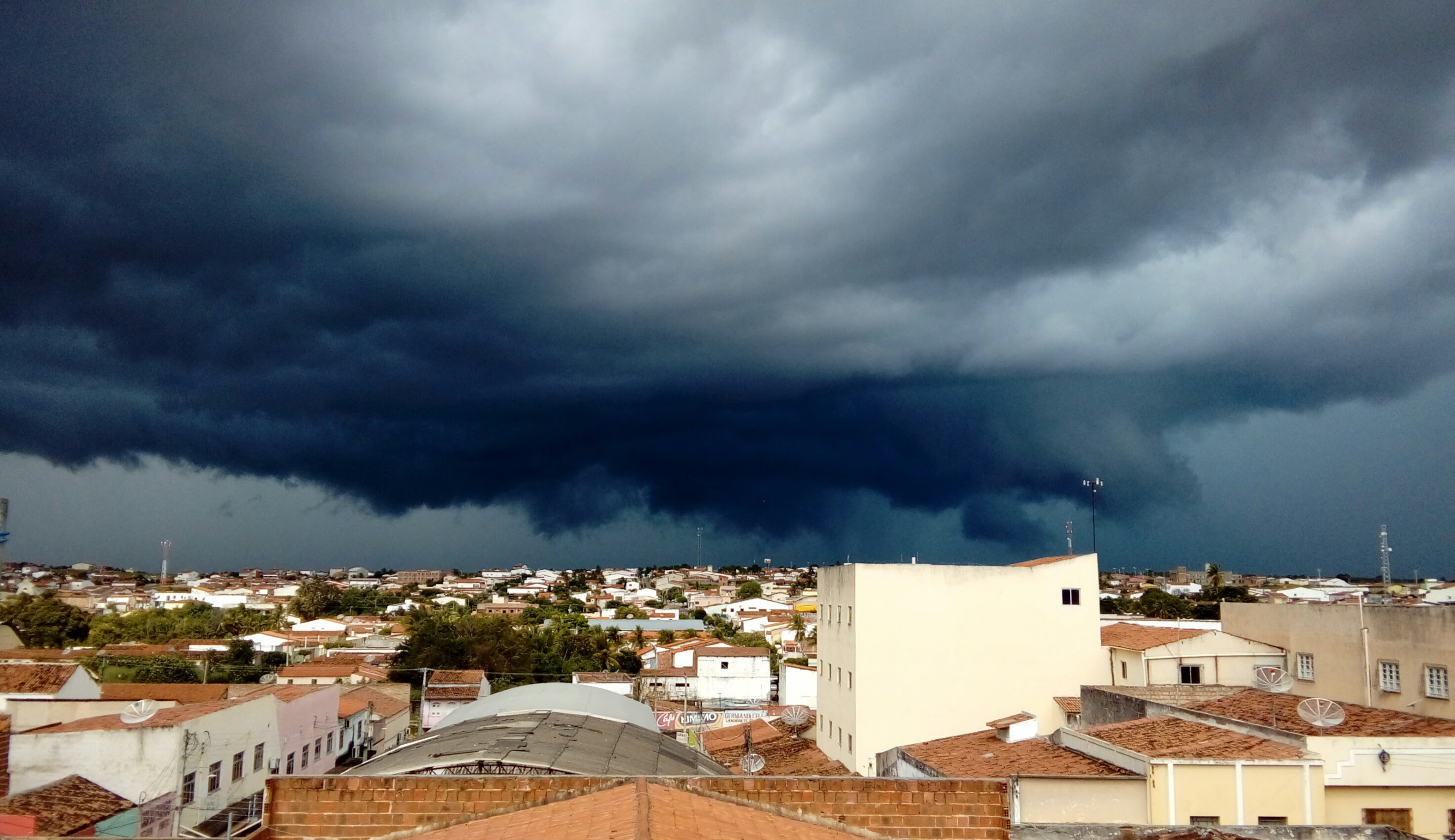 Chuva na cidade em março de 2017